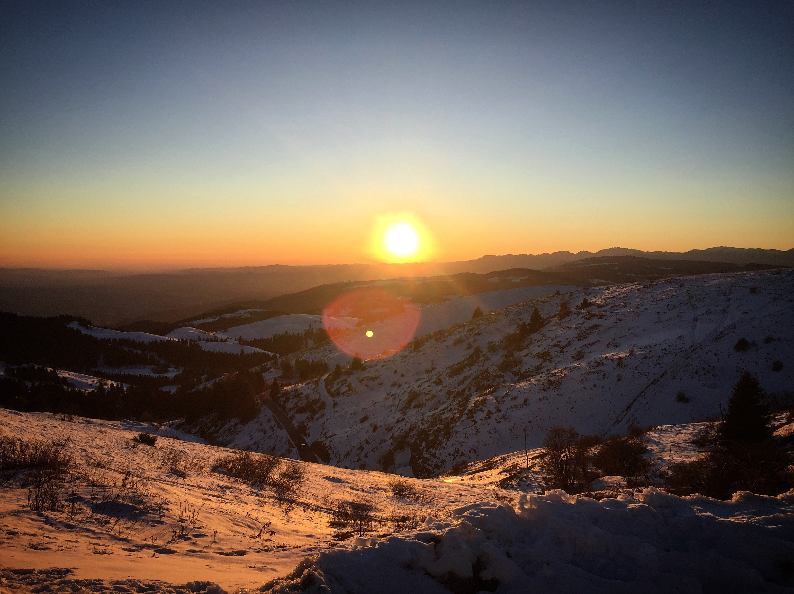 Massiccio del Grappa (Q49963034)